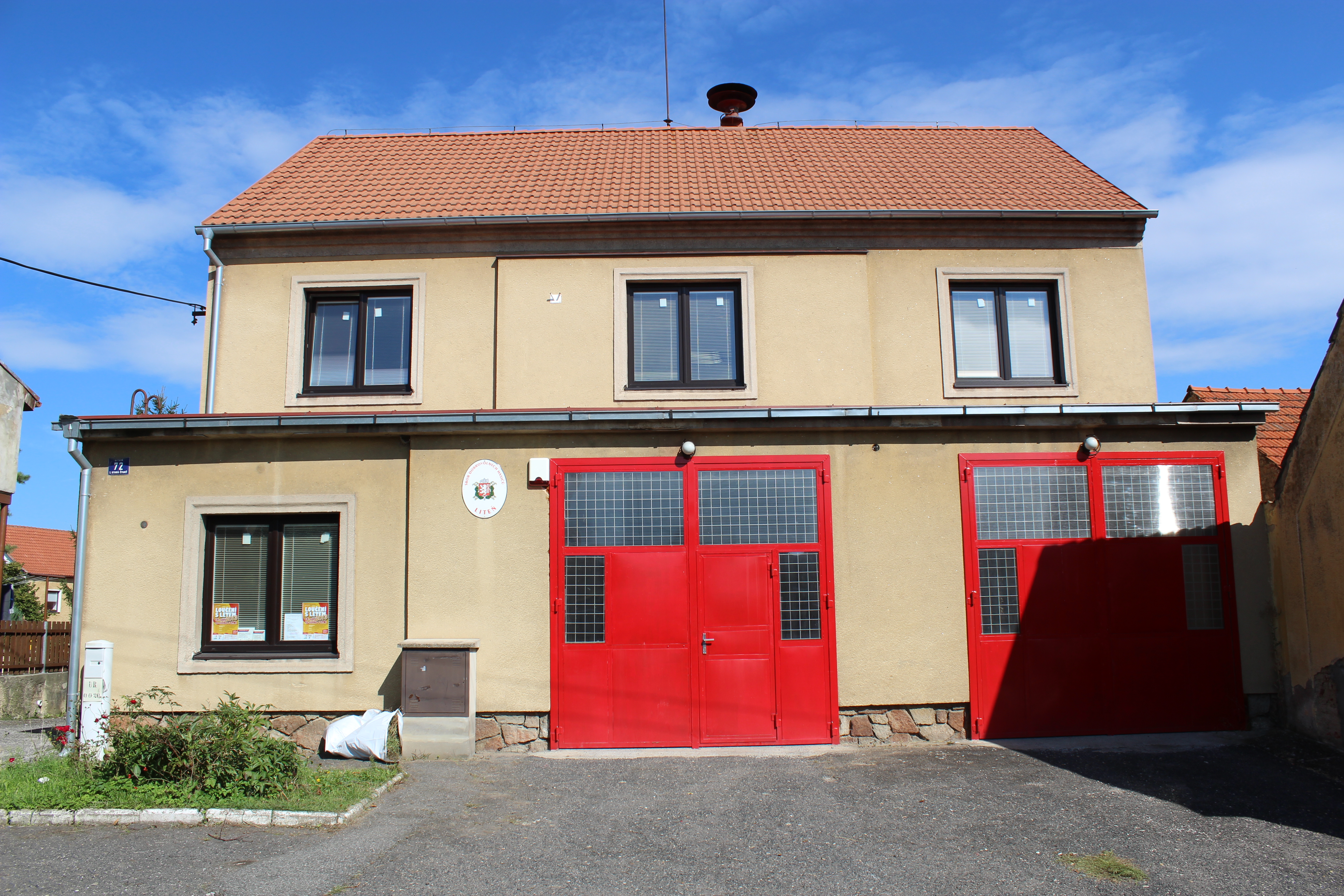 Hasičská zbrojnice v Litni vznikla radikální představbou židovské synagogy.